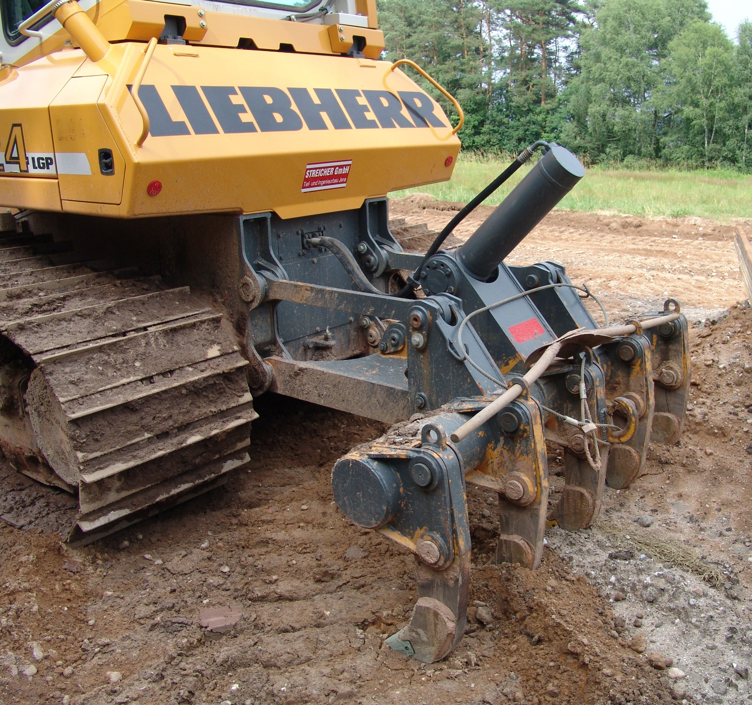 Liebherr 724 Planierraupe